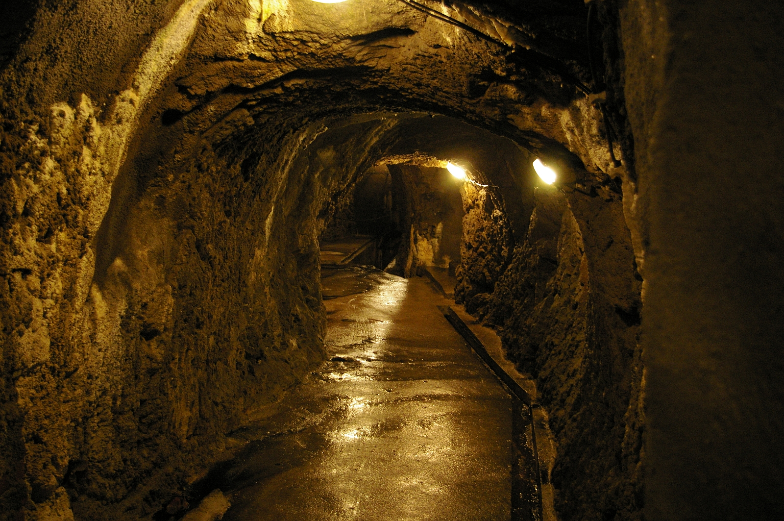 Jihlava katakomby 1